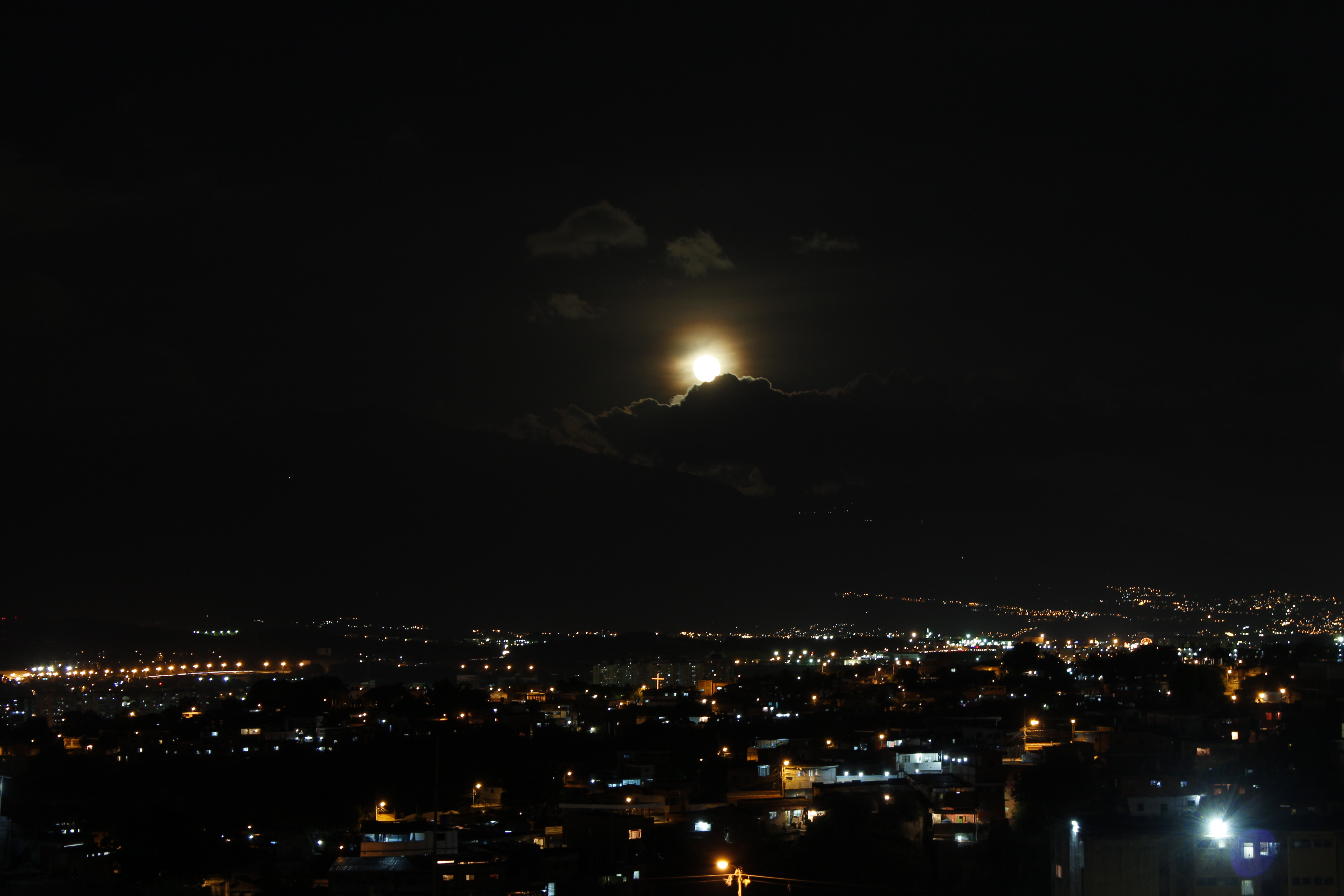 Vista nocturna de Guarenas-Guatire